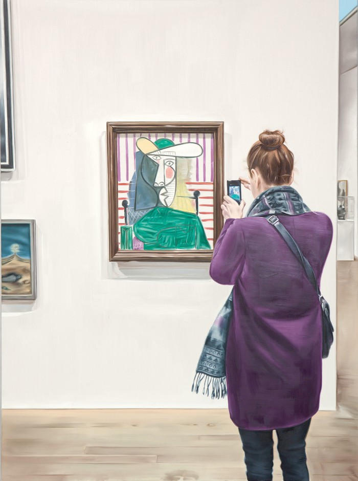 Obraz "Popiersie kobiety (1944)" oparty jest na stosunkowo nowej dla Marcina Maciejowskiego autoreferencyjnej grze z widzem. Przedstawia on bowiem widza oglądającego i powielającego na swoim smartfonie, tytułowy obraz Picassa, znajdujący się na ścianie w Muzeum. Widz powtarza w pewnym sensie gest Maciejowskiego, który również zawłaszcza w ramach własnego przedstawienia obraz Picassa. Artysta składa w ten sposób hołd jednemu ze swoich ulubionych malarzy, ale jednocześnie komentuje nasz zapośredniczony przez media kontakt z rzeczywistością. Pokazuje współczesne doświadczenie malarstwa, przefiltrowanego zarówno na poziomie tworzenia jak i odbioru, przez fotografię cyfrową. Malarstwa, które trudno już odseparować od naszego "banalnego" zanurzenia w opartej na zwielokrotnieniu obrazu - internetowej komunikacji wizualnej.